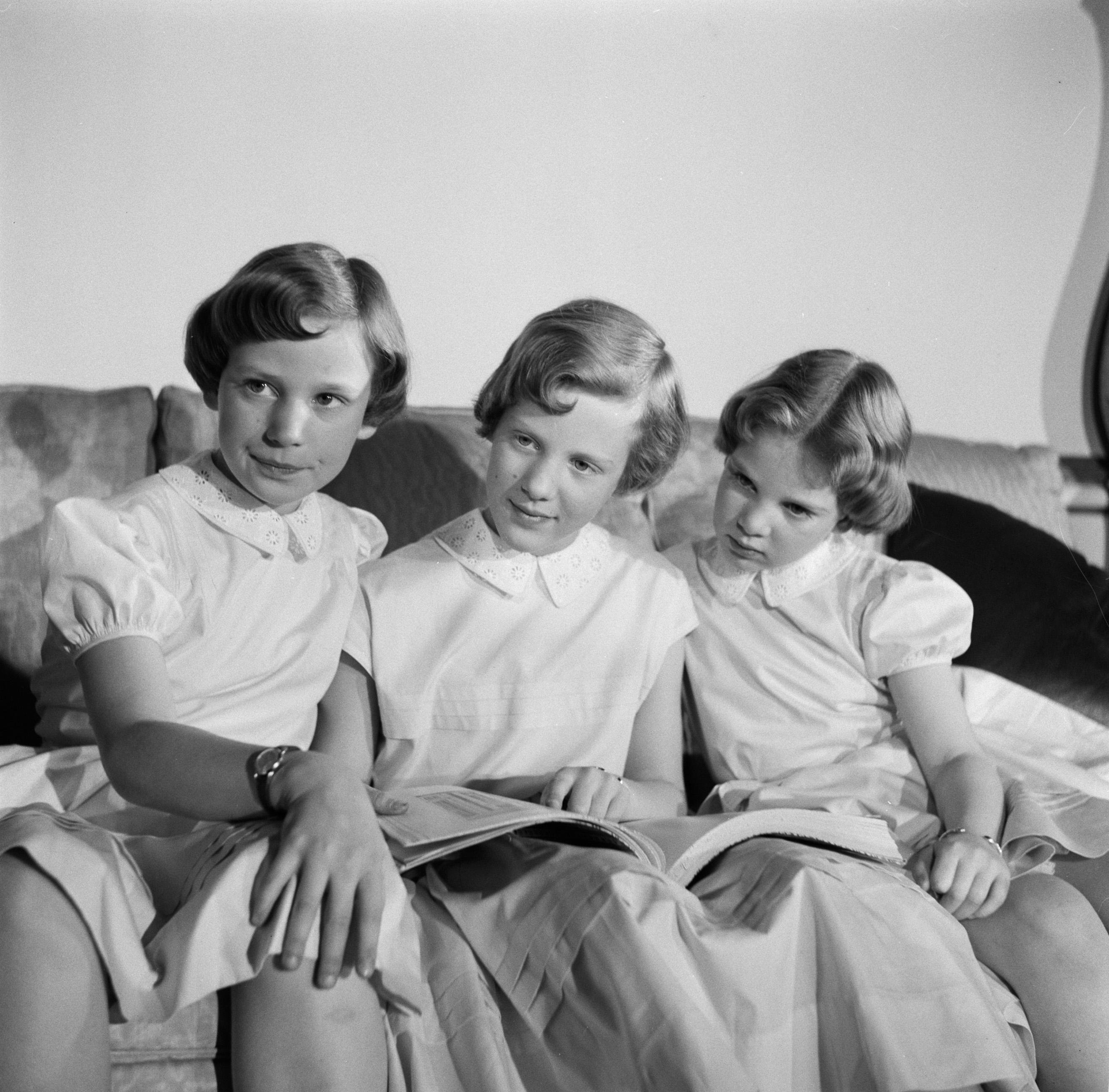 Collectie / Archief : Fotocollectie Van de Poll Reportage / Serie : Gezinsfoto's van de Deense koninklijke familie Beschrijving : V.l.n.r. Prinses Benedikte, Prinses Margrethe en Prinses Anne Marie met een boek op de bank in paleis Brockdorff Datum : maart 1954 Locatie : Denemarken, Kopenhagen Trefwoorden : boeken, gezinnen, interieurs, kinderen, klokken, meubilair, paleizen, prinsessen, woningen, zitbanken Persoonsnaam : Anne Marie (prinses Denemarken), Benedikte (prinses Denemarken), Margrethe (kroonprinses Denemarken) Fotograaf : Poll, Willem van de, [onbekend] Auteursrechthebbende : Nationaal Archief Materiaalsoort : Negatief (zwart/wit) Nummer archiefinventaris : bekijk toegang 2.24.14.02 Bestanddeelnummer : 252-8648